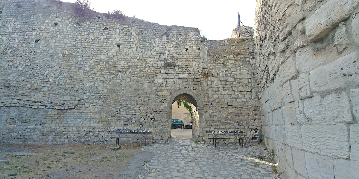 Puerta de Augusto, parte de las murallas que protegian Arles durante el dominio del imperio romano.